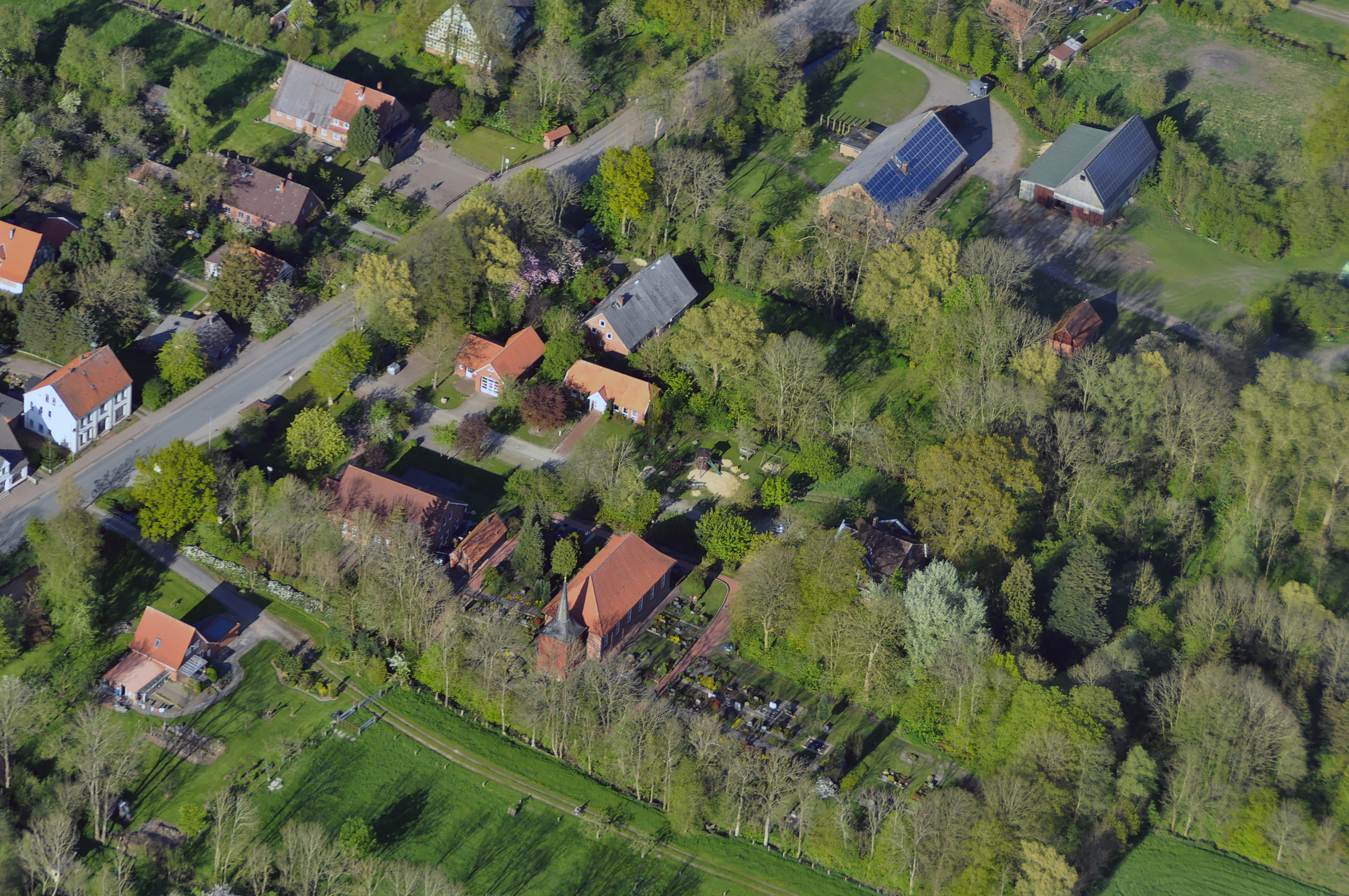 Luftbilder von der Nordseeküste 2012-05